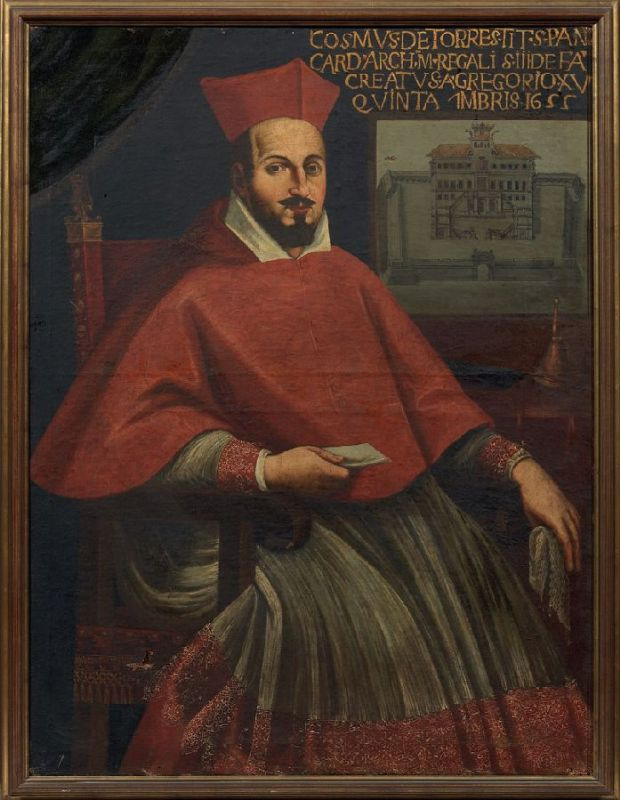 Scuola romana fine XVII secolo RITRATTO DEL CARDINALE COSIMO DE TORRES Olio su tela, cm. 133,5x98,5 Reca in alto l'epigrafe: COSMUS DE TORRES TIT S PAN CARD ARCH M REGALIS III DEFA CREATUS A GREGORIO XV QUINTA 7MBRIS 1622. 155 - ASTA DI ARREDI E DIPINTI ANTICHI - I - PRATO, VEN 15 APRILE 2011